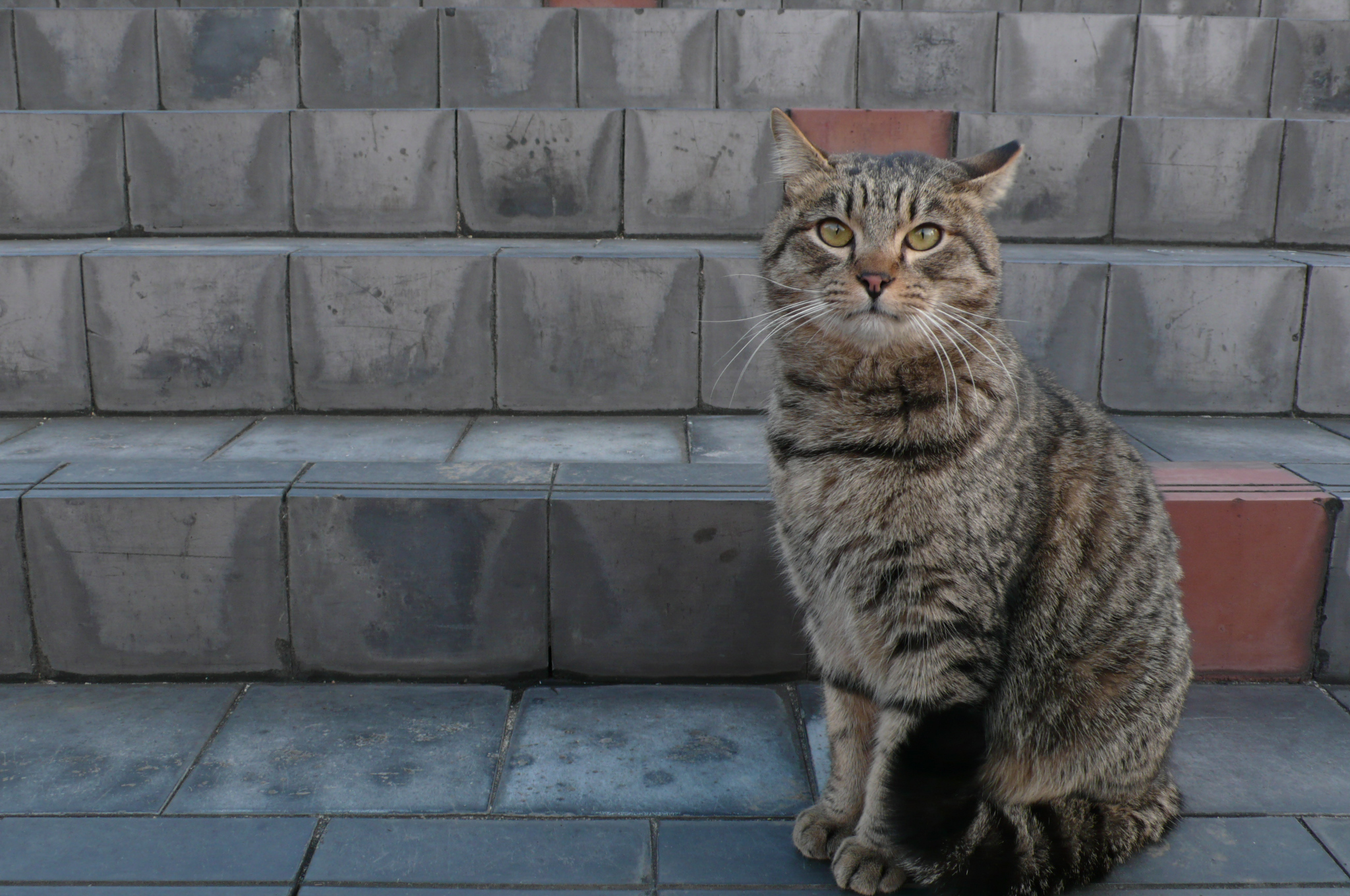 L1580167.JPG